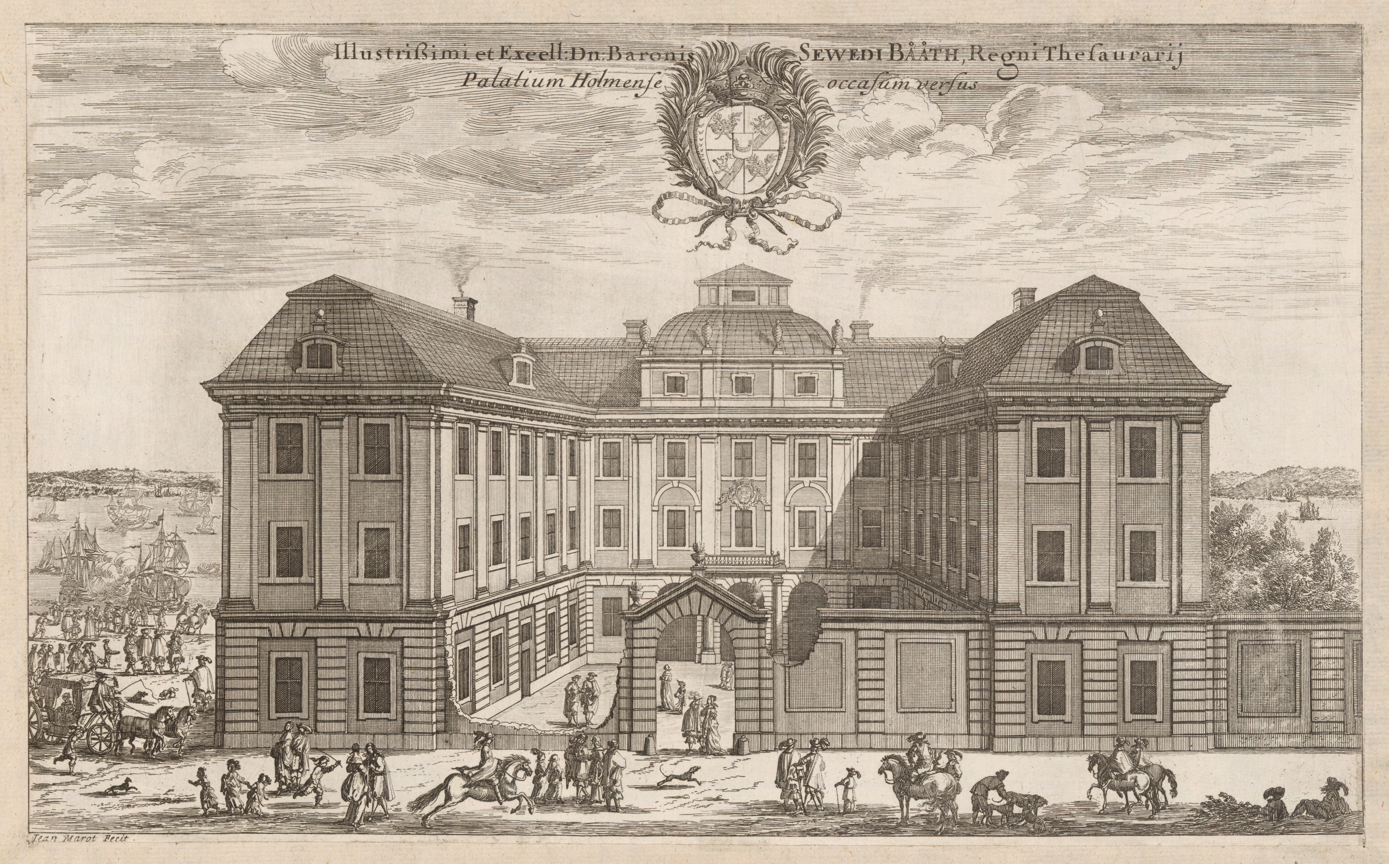 Titel i svensk övers. : Riksskattmästaren friherre Seved Bååts palats i Stockholm från väster